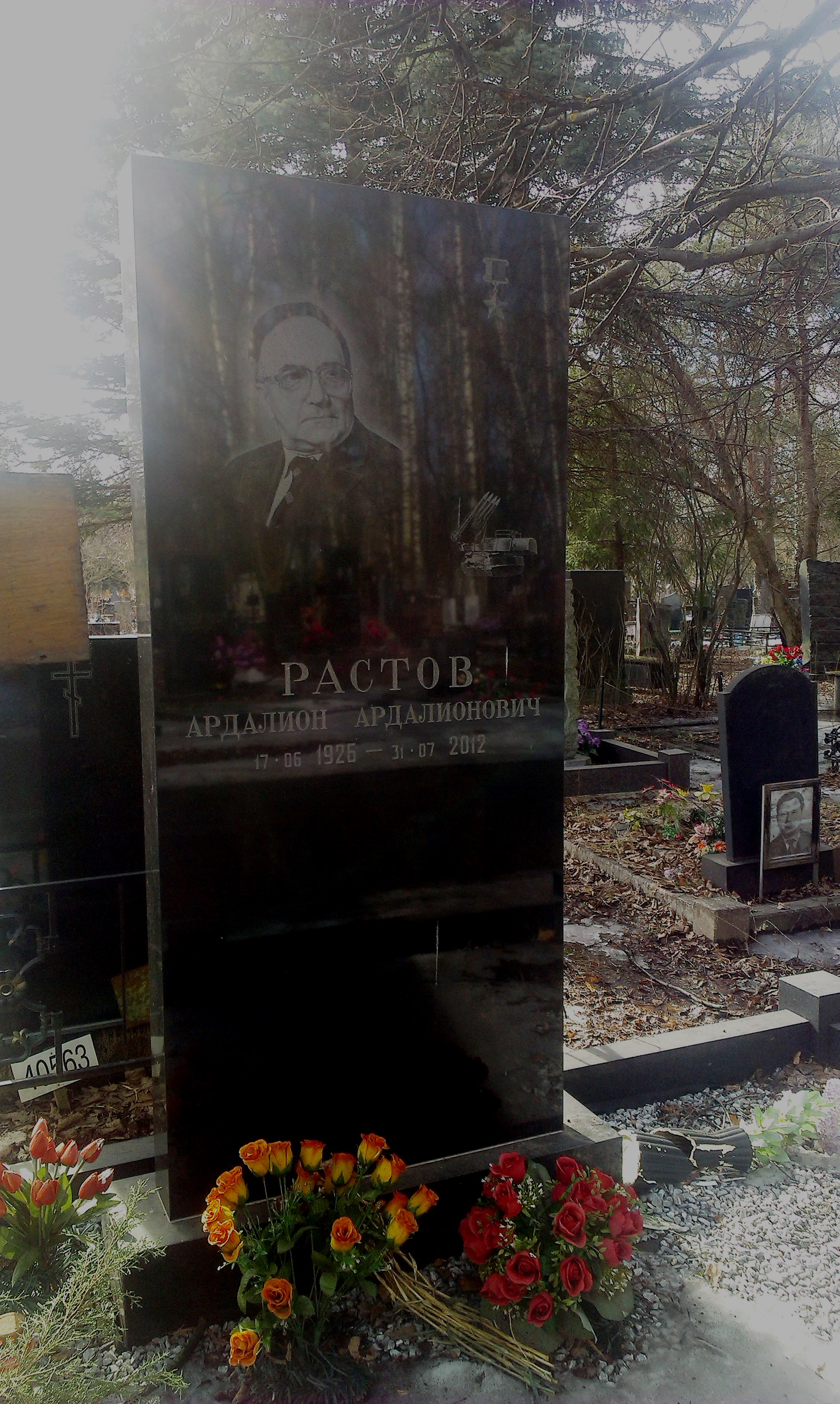 Кладбище села Островцы